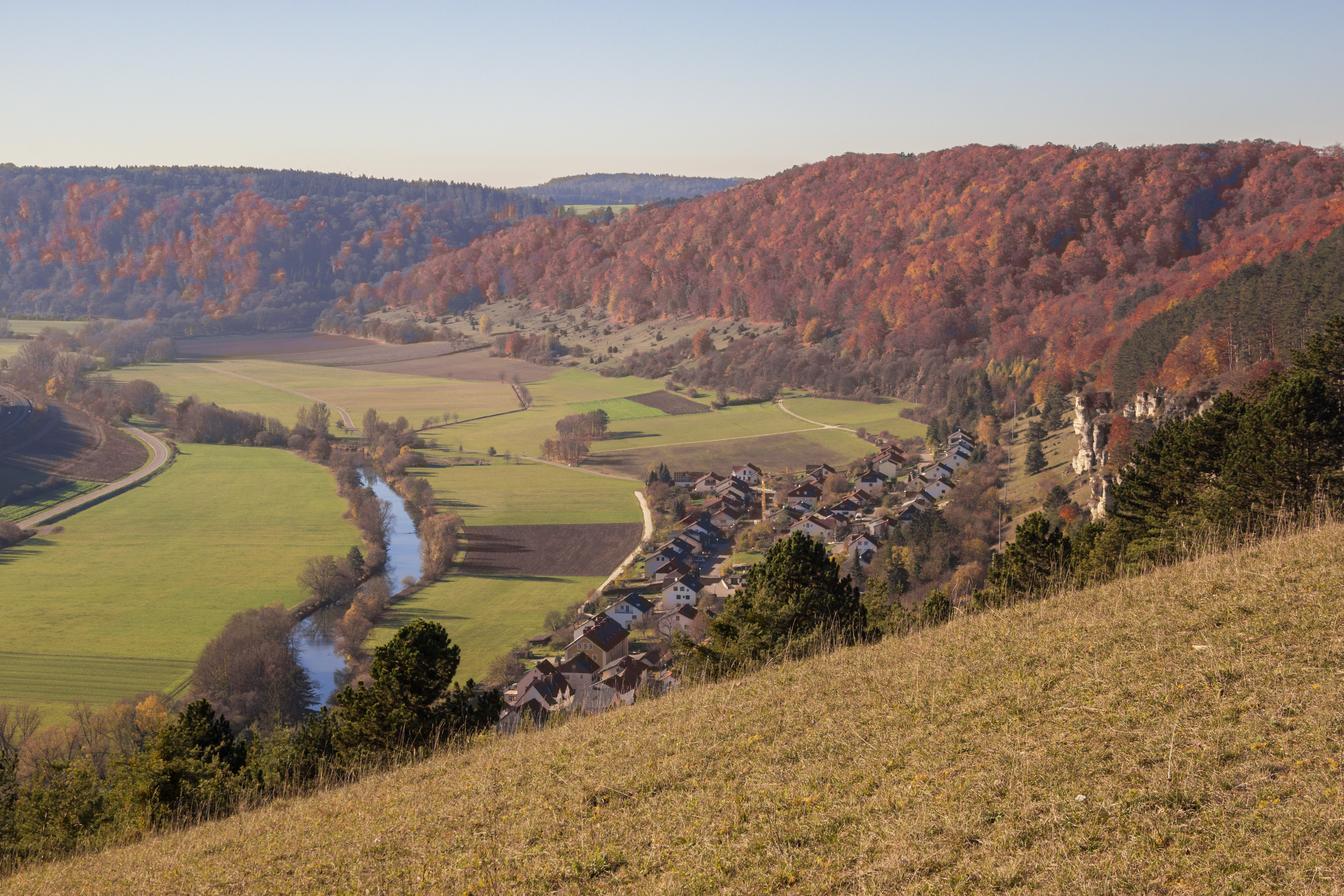 Obereichstätt